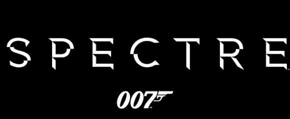 Logo oficial de la película Spectre de James Bond